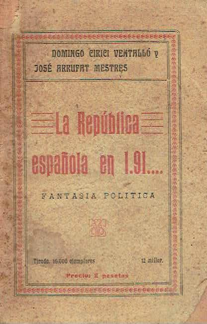 La República española en 1.91...